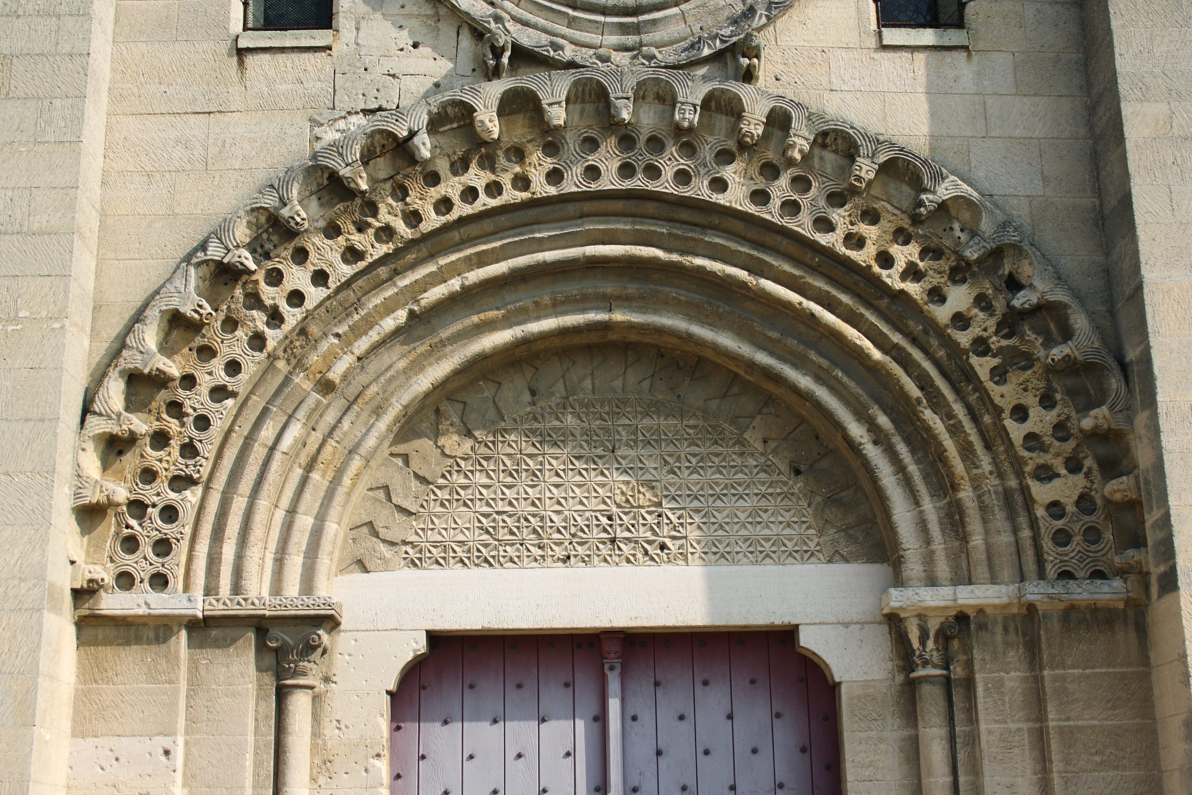 Kirche Sainte-Anne in Gassicourt, einem Stadtteil von Mantes-la-Jolie im Département Yvelines (Île de France), romanisches Portal